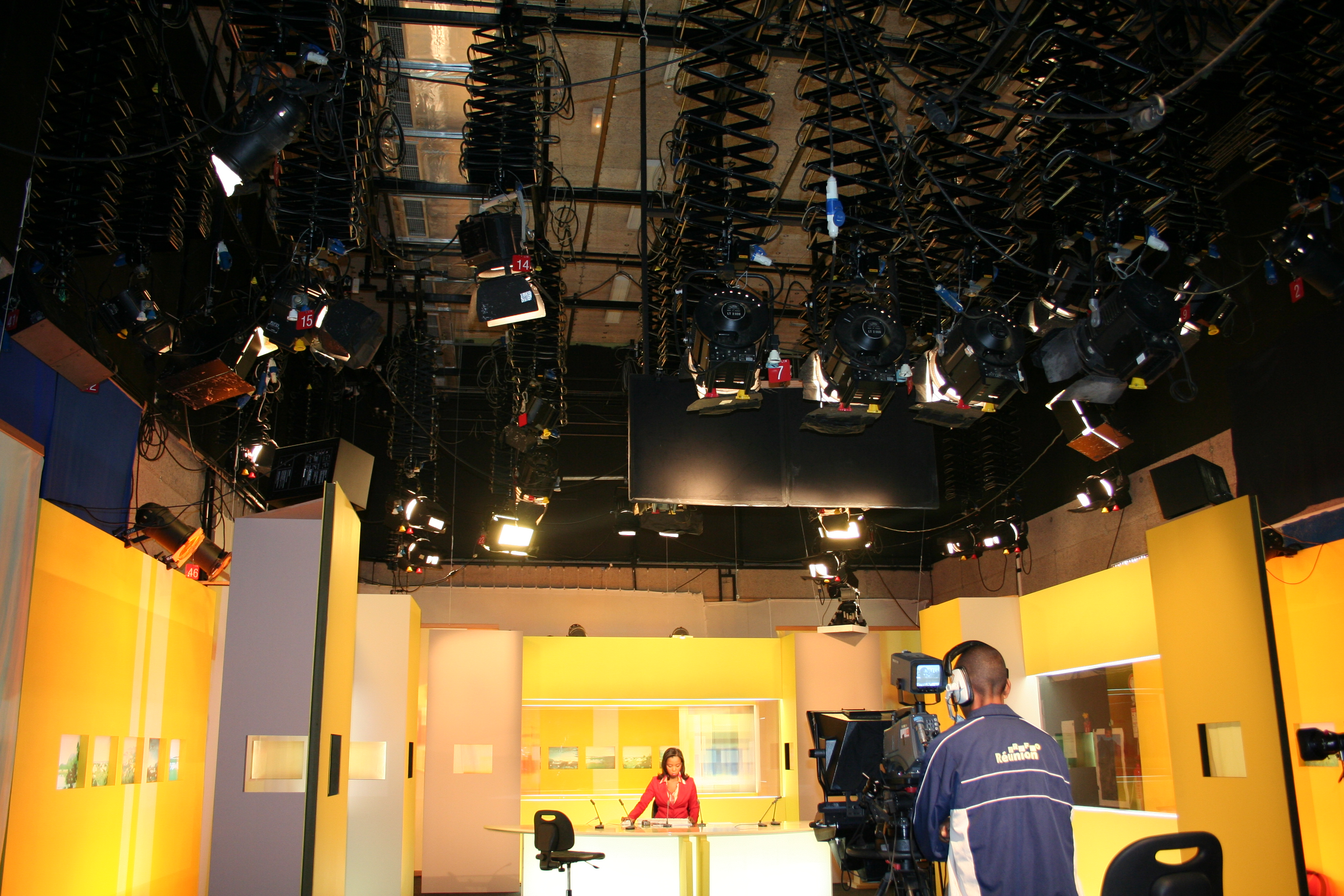 L'éclairage d'un plateau télévisé de Télé Réunion.